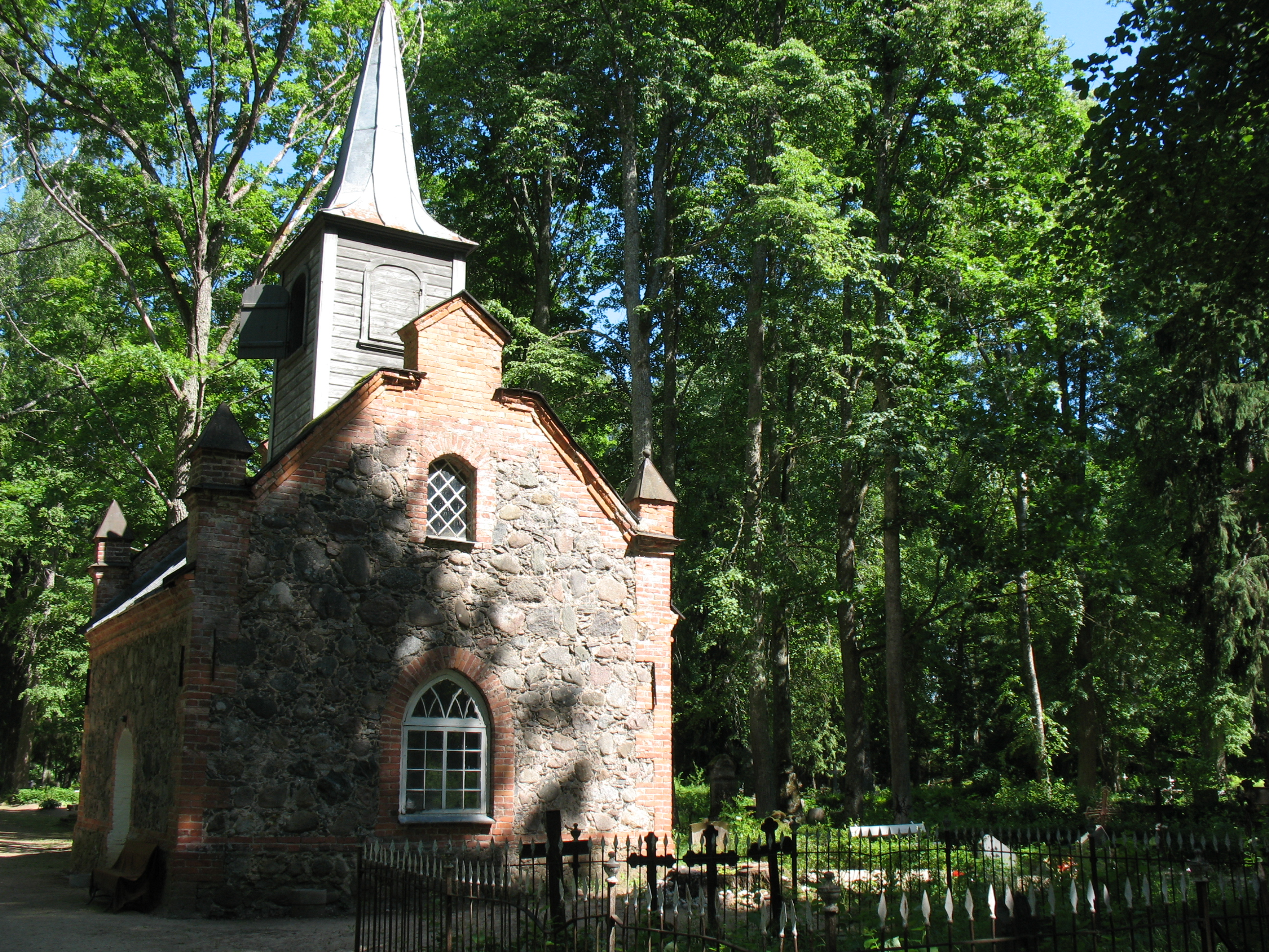 Tartu maakond, Rannu vald